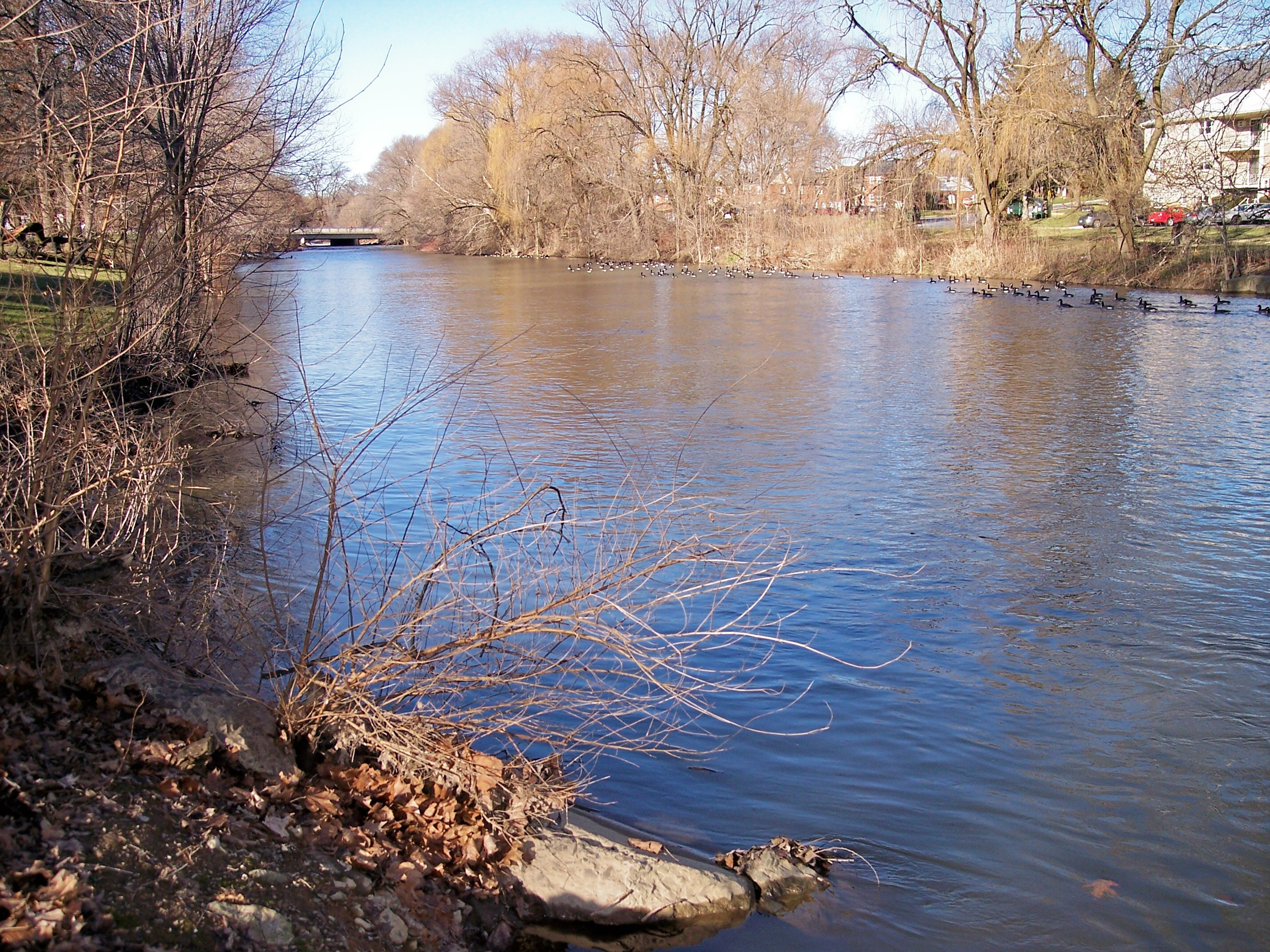 Jordan Creek in Jordan Park in Allentown, Pennsylvania